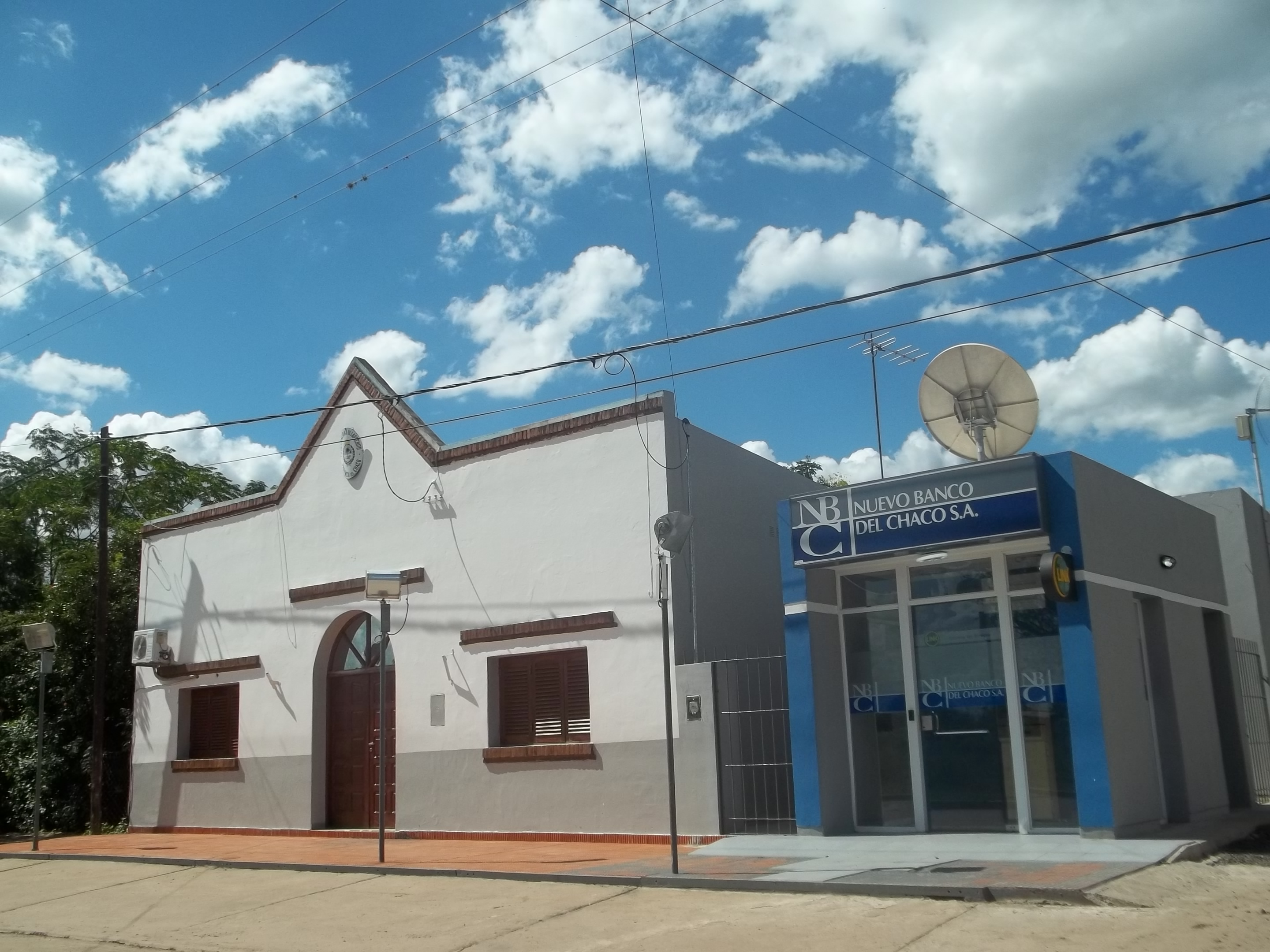 Sede del municipio de Lapachito y un cajero automático.